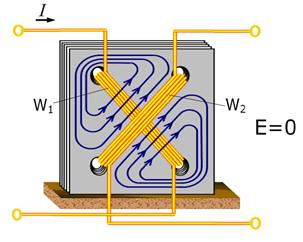 Magnetoanisotroopne muundur